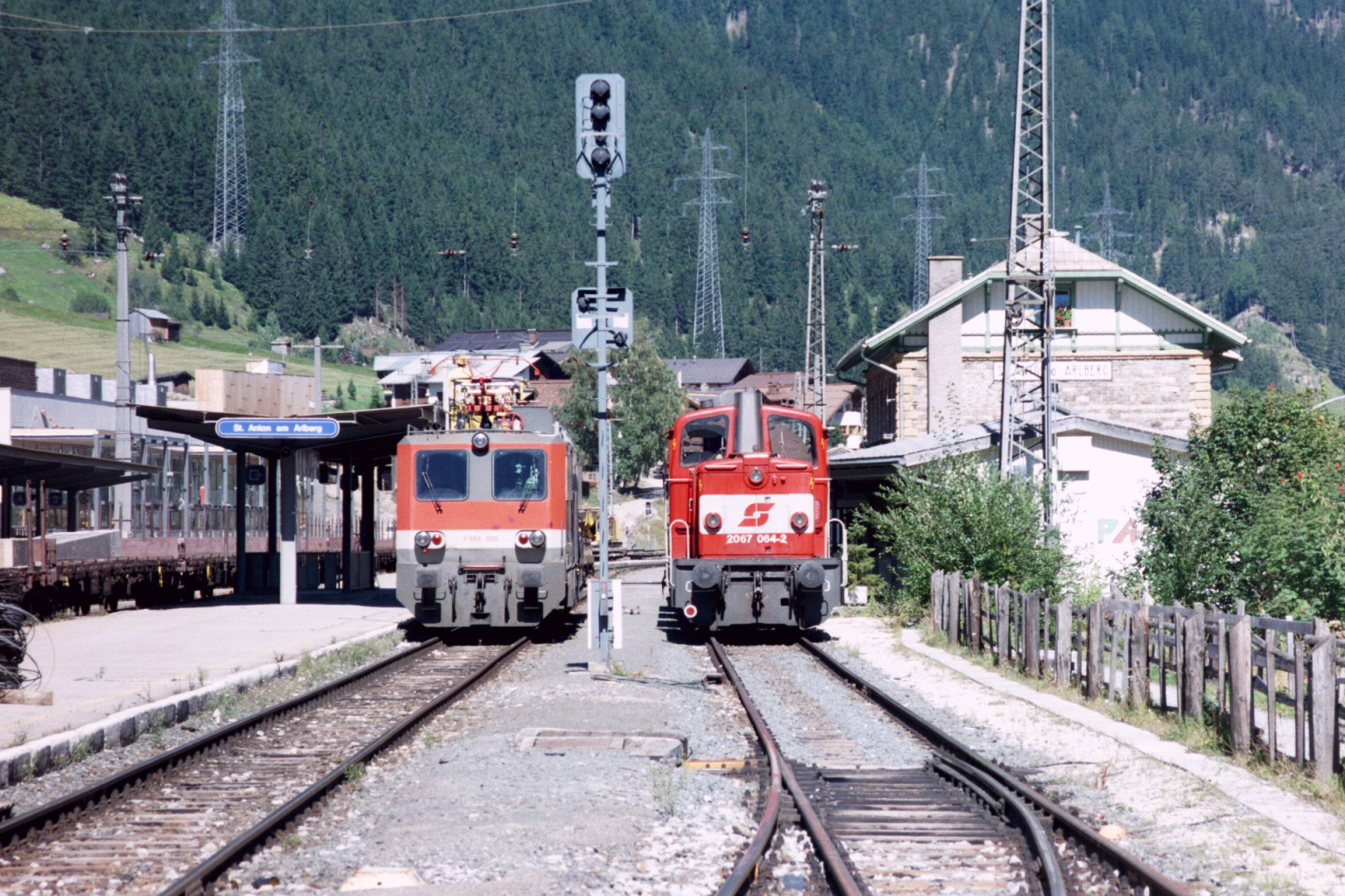 Der alte Bahnhof St. Anton am Arlberg, der nach der Streckenverlegung der Arlbergbahn nicht mehr in Betrieb ist und durch einen Neubau am südlichen Ortsrand ersetzt wurde.